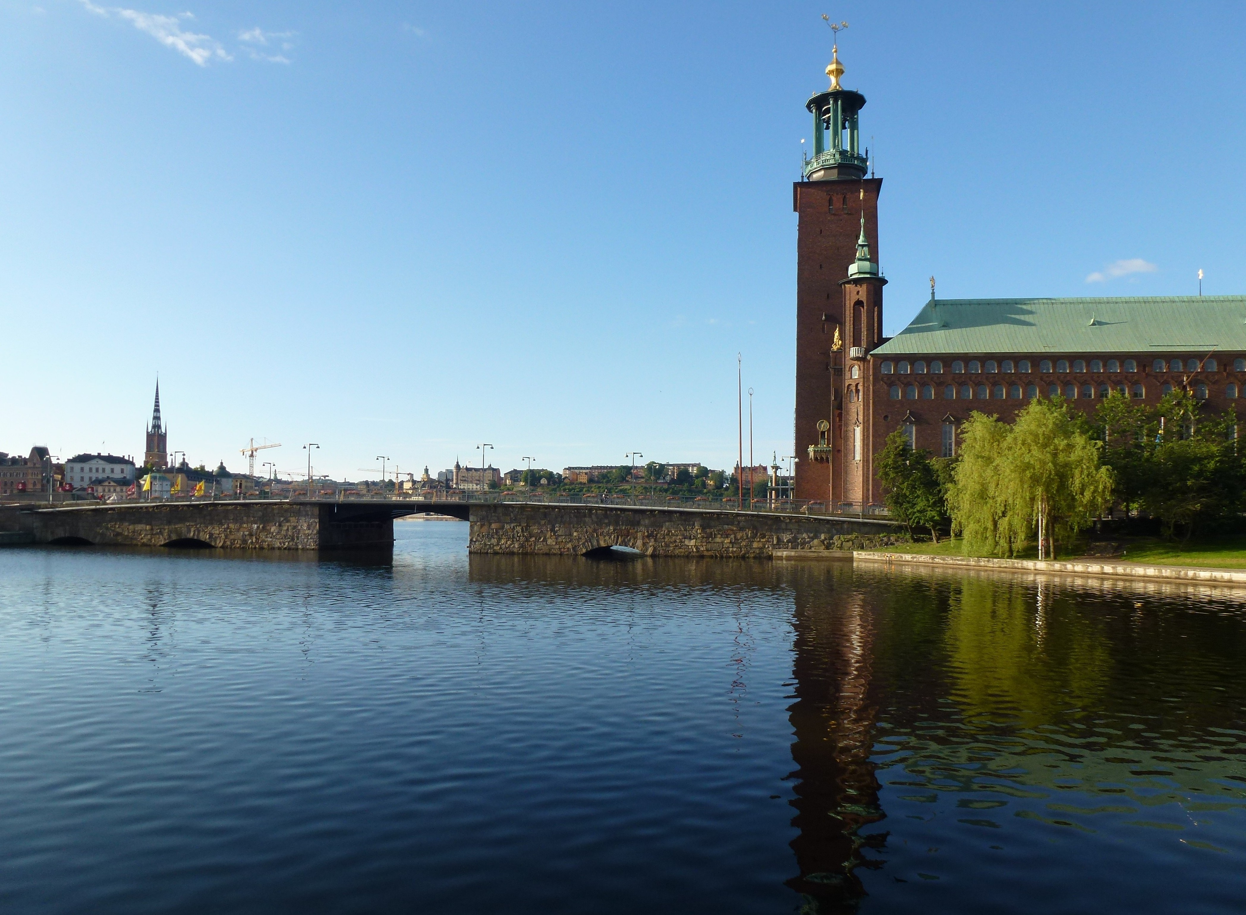 Stadshuset, Stadshusbron och Klara sjö